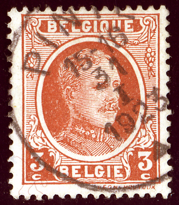 Timbre de Belgique, émission de 1922, 3 c rouge-brun, Yvert et COB N°192. Oblitération de 1923 à identifier.